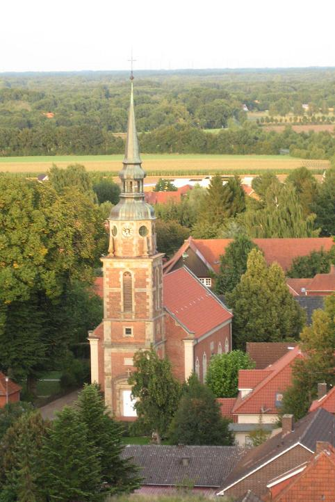 Die Luther-Kirche wurde 1839 als Saalkirche – zunächst nur mit Dachreiter versehen – erbaut. 1896 erfolgte der Turmbau.